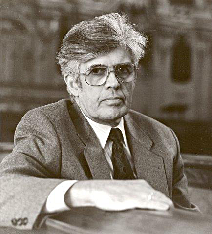 Der ehemalige Domkapellmeister Konrad Wagner, von 1955 bis 1997 Chorleiter und Instruktor der Dresdner Kapellknaben in der Katholischen Hofkirche in Dresden.